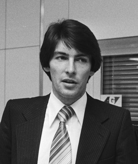 Aankomst Glasgow Rangers op Schiphol, tegenstander PSV; Gordon Smith